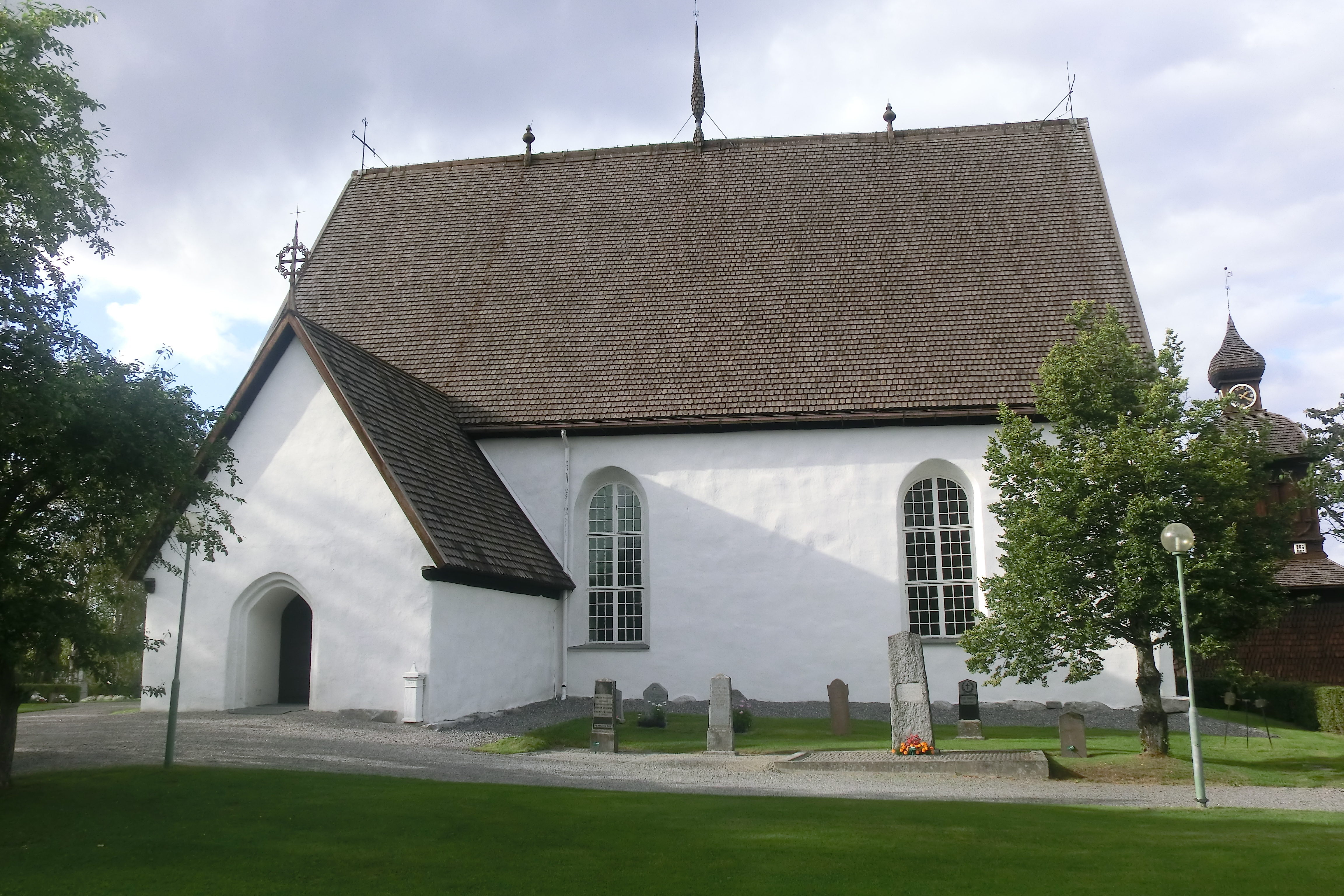 Anundsjö kyrka i Örnsköldsviks kommun